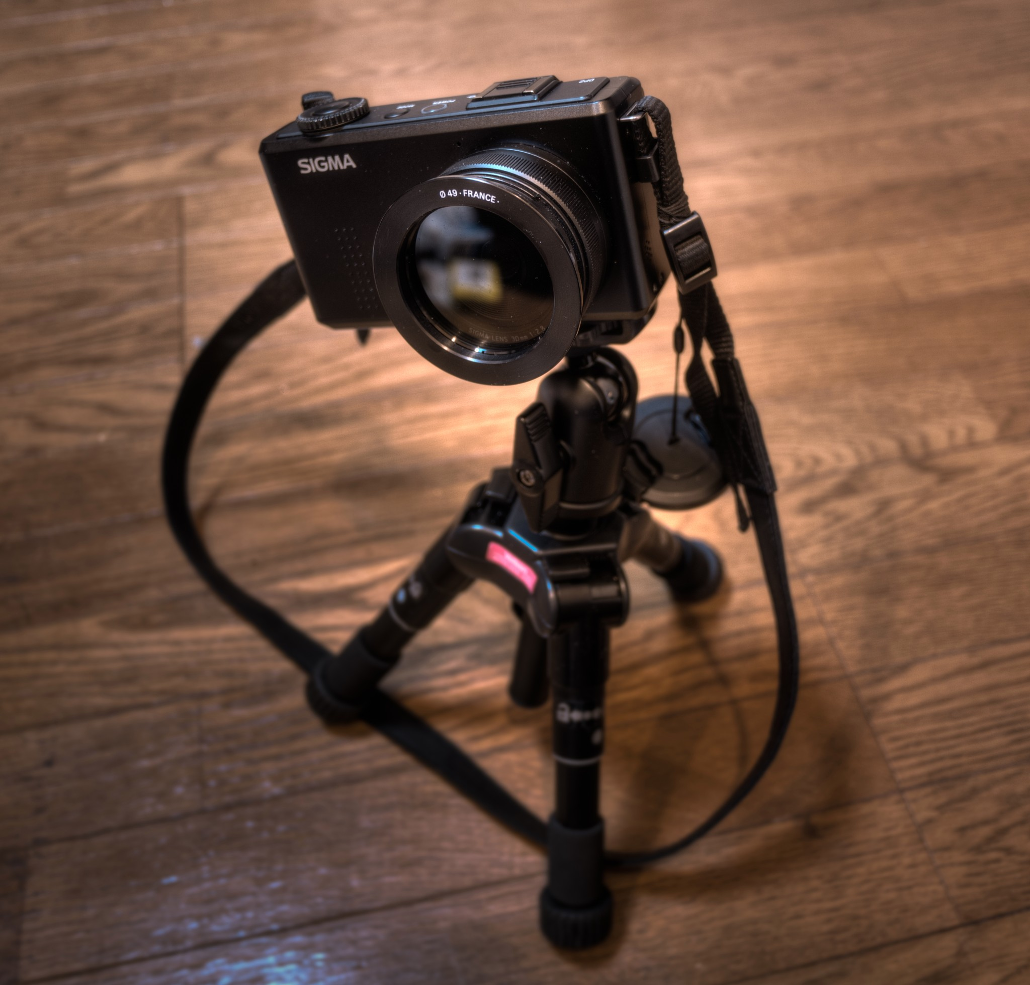 Sigma DP2 Merrillにフィルタを付けてVelbon三脚の上に載せたところ